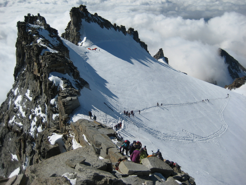 Arrivée au sommet du Gran Paradiso